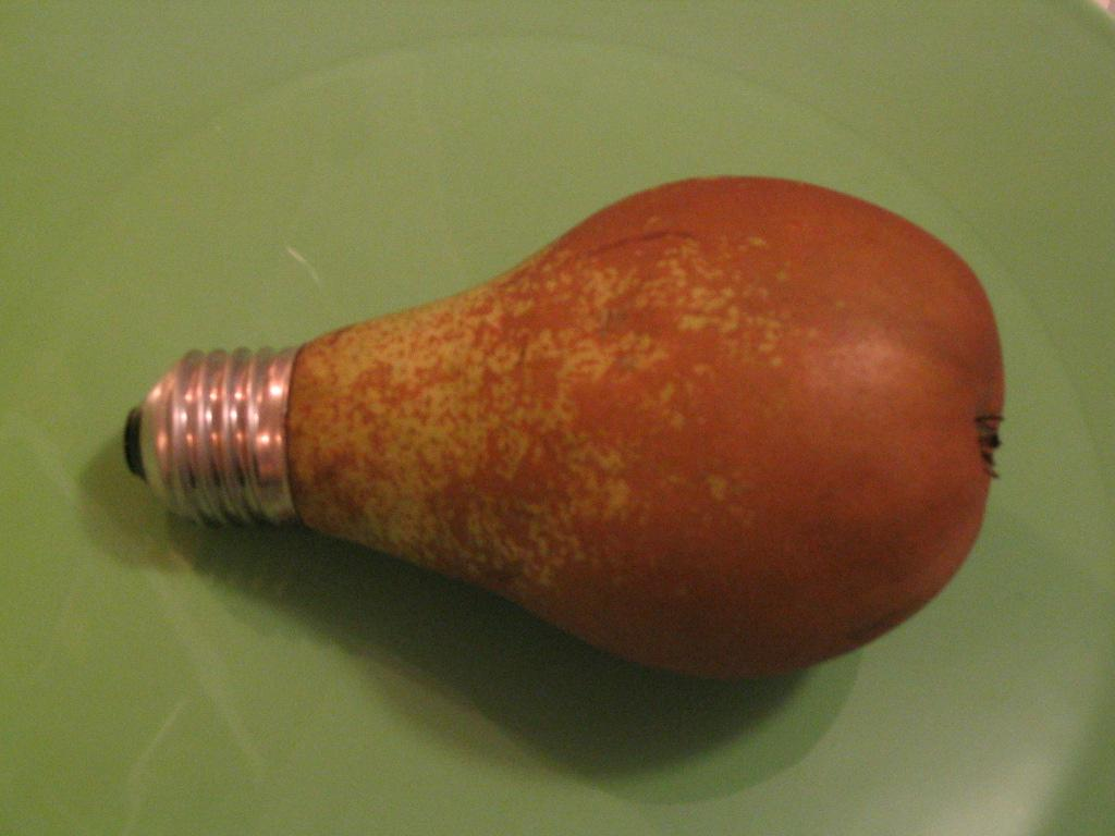 Door de auteur zelf geënsceneerde foto.